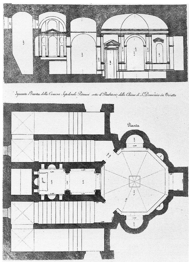 Pianta della cappella Petrucci presso la chiesa di San Domenico a Orvieto. Disegno di Francesco Ronzani. Progetto di Michele Sanmicheli.